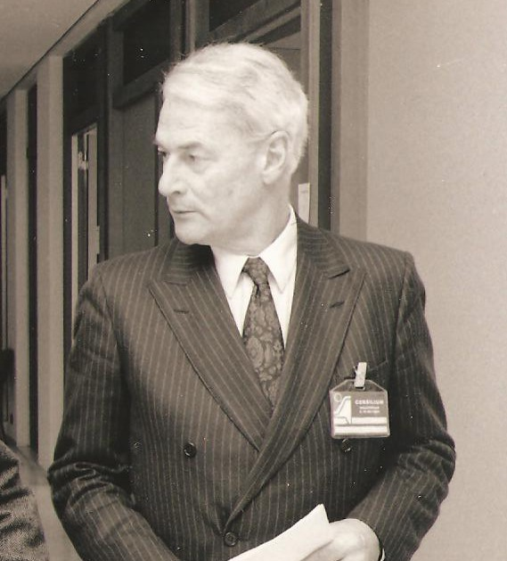 Ronald van Beuge, 1991